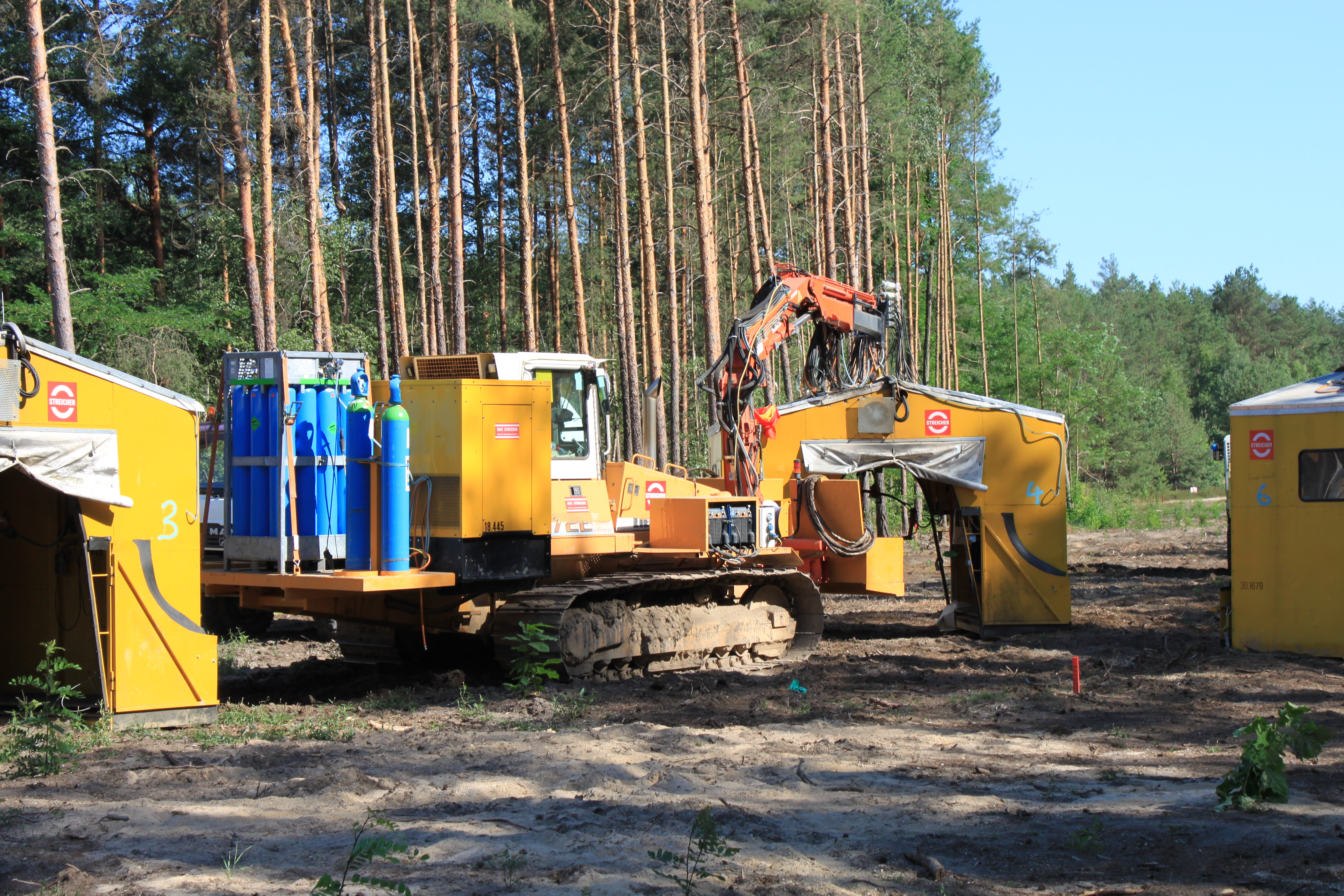 Bagger mit Rohrschweißtechnik, beim Bau der OPAL bei Finsterwalde